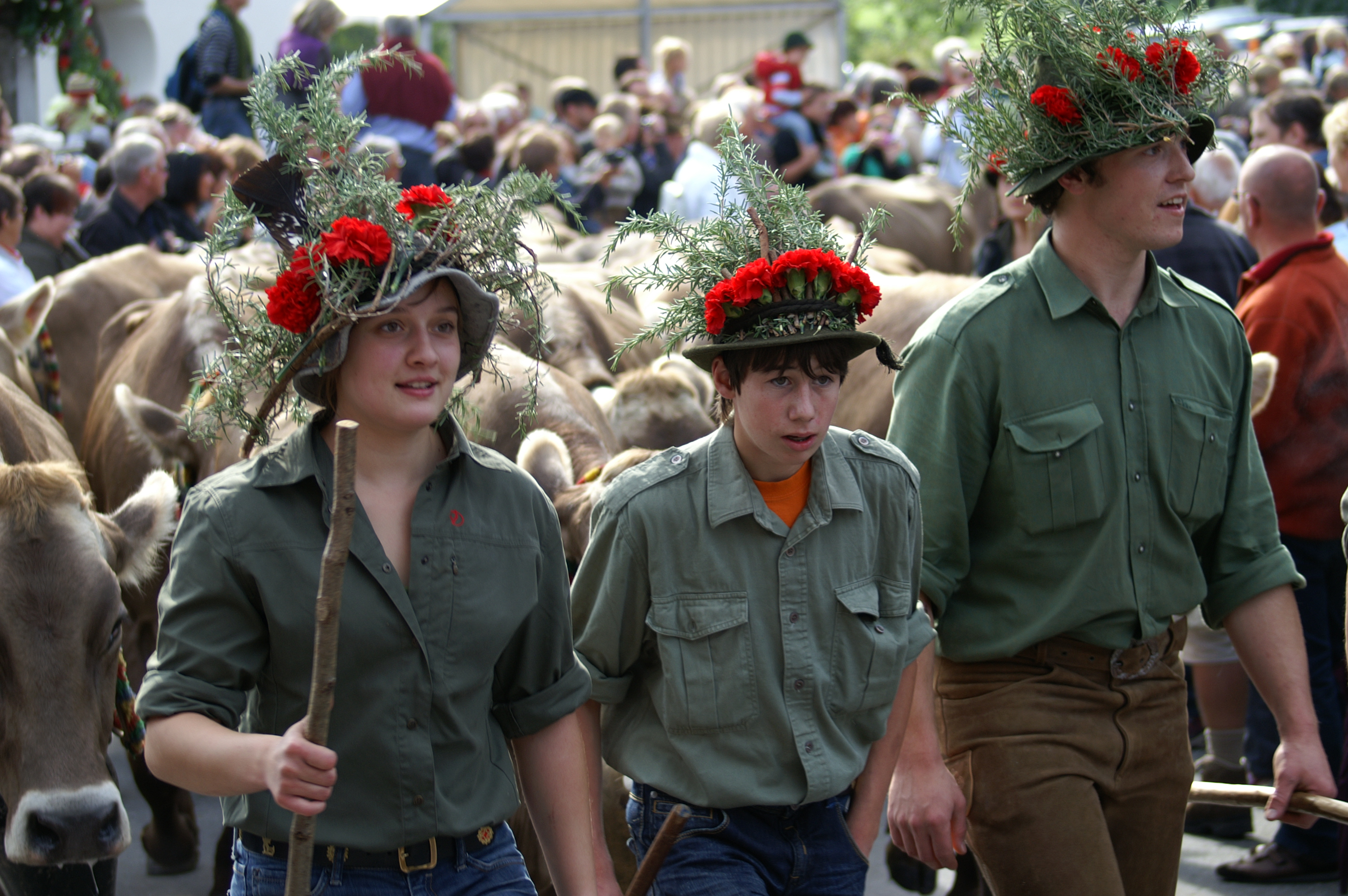 Der Schwarzenberger Alptag mit dem traditionellen Almabtrieb am 15.September.